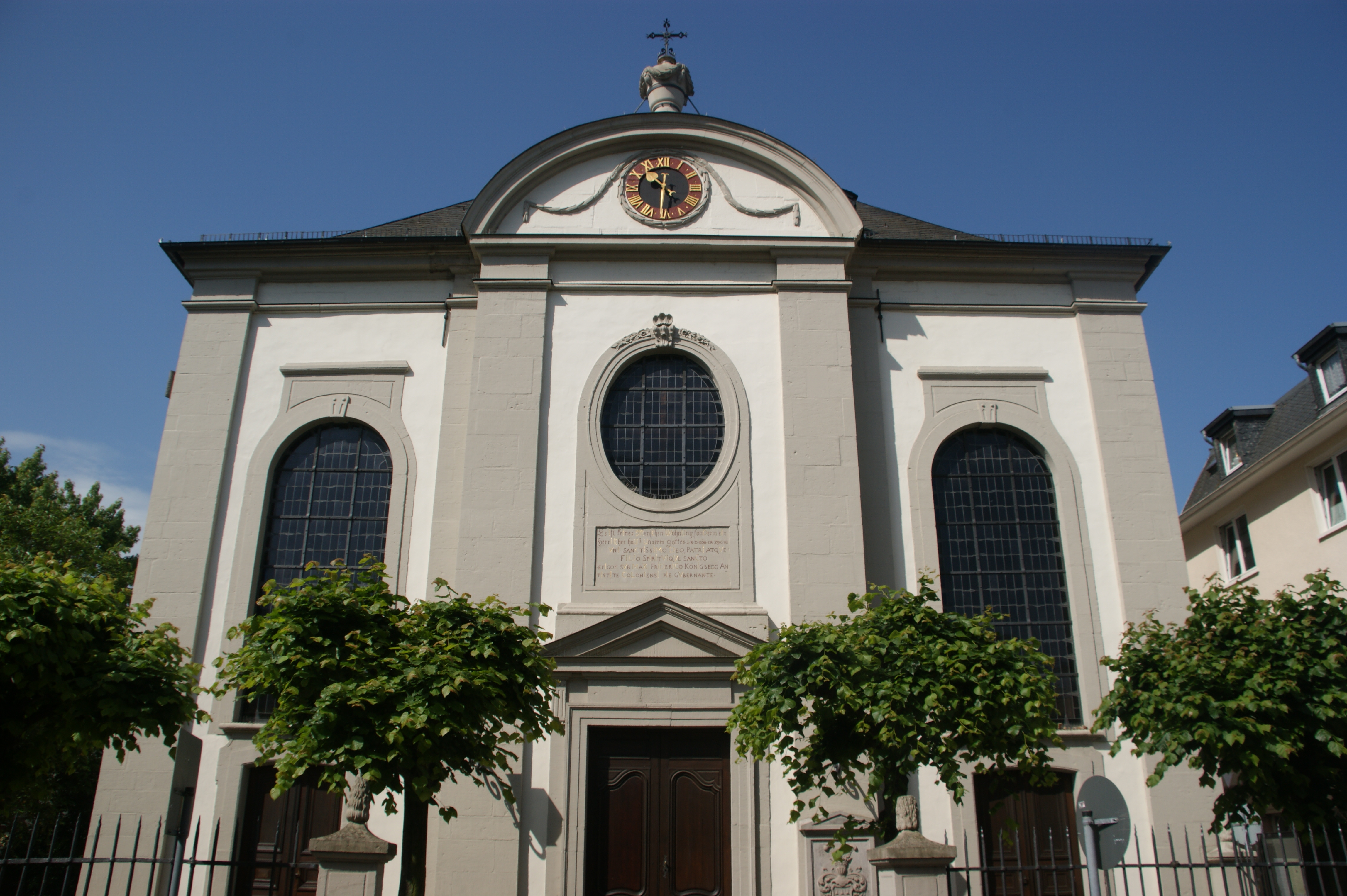 Katholische Kirche von Königswinter, Sankt Remigius, Eingangsseite